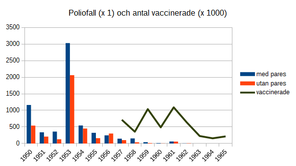 Diagrammet visar antal rapporterade fall av polio och antal poliovaccinerade i Sverige 1950 - 1964